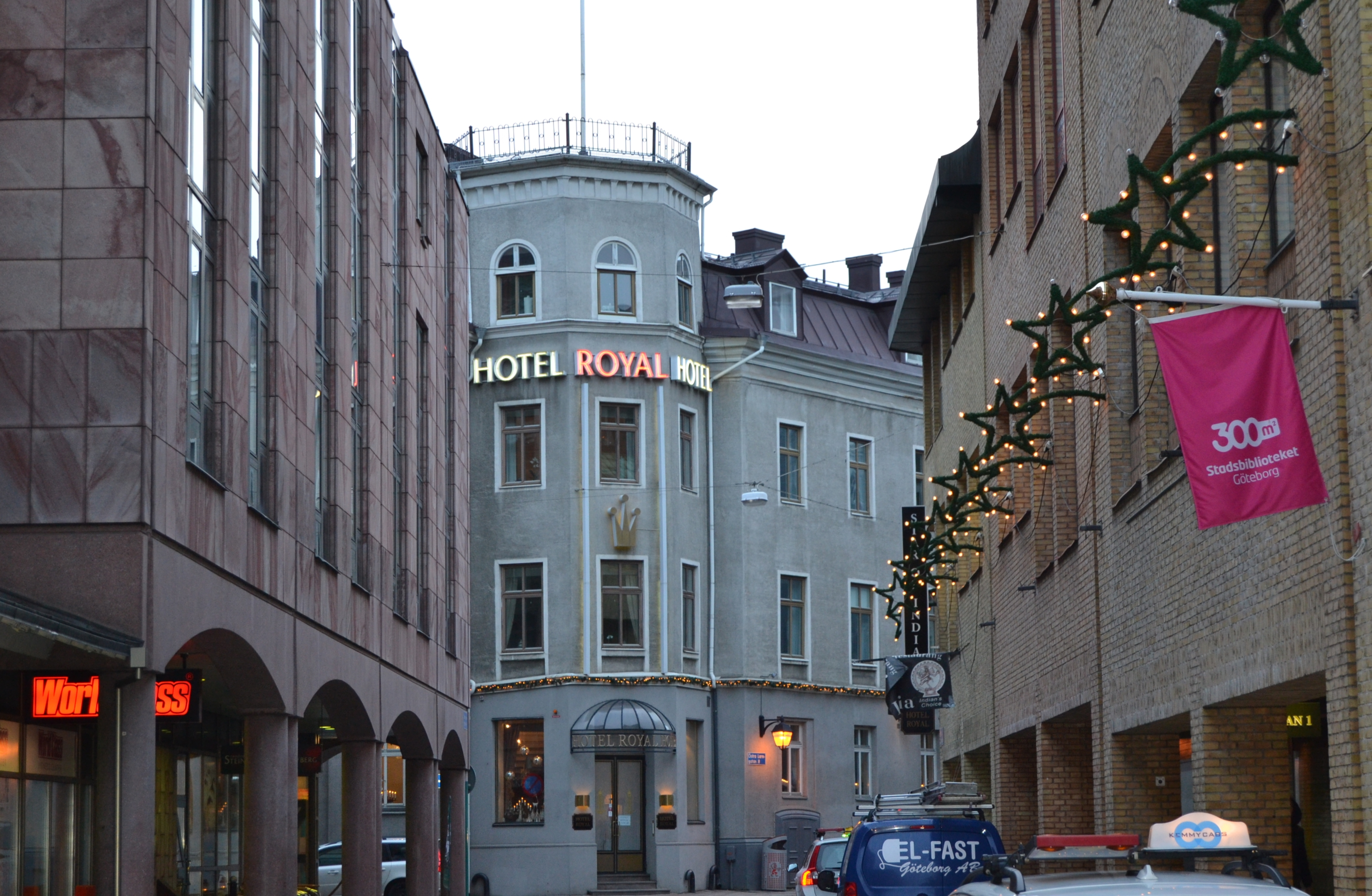 Hotel Royal Vid Drottningtorget i Göteborg